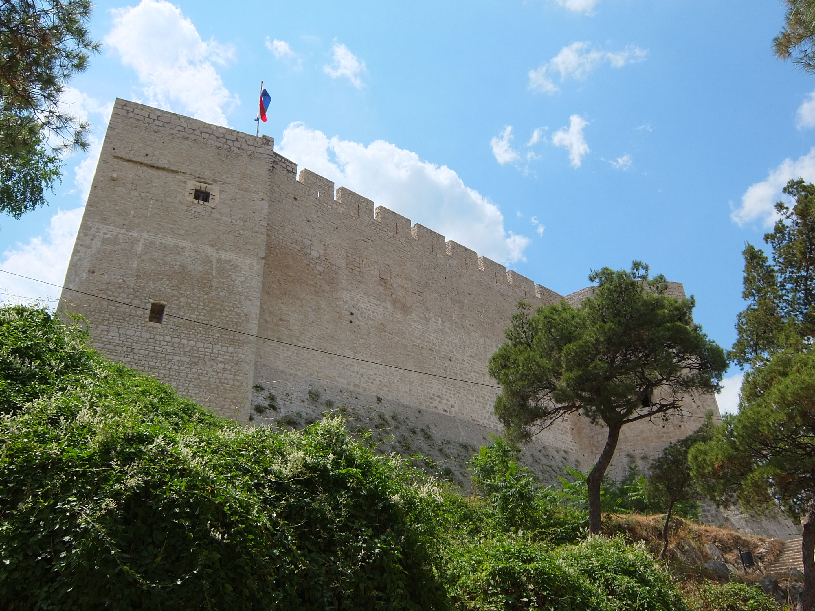 Srpskohrvatski / српскохрватски: Sjeverositočna kula šibenskog kaštela